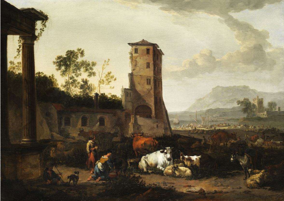 Fantasielandschaft mit antiken Ruinen und Hirtenidylle